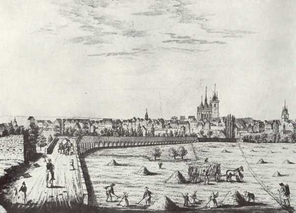 Pohled na Louny od severu přes inundační most. Kresba J. Gutsche, 1. pol. 19. stol.